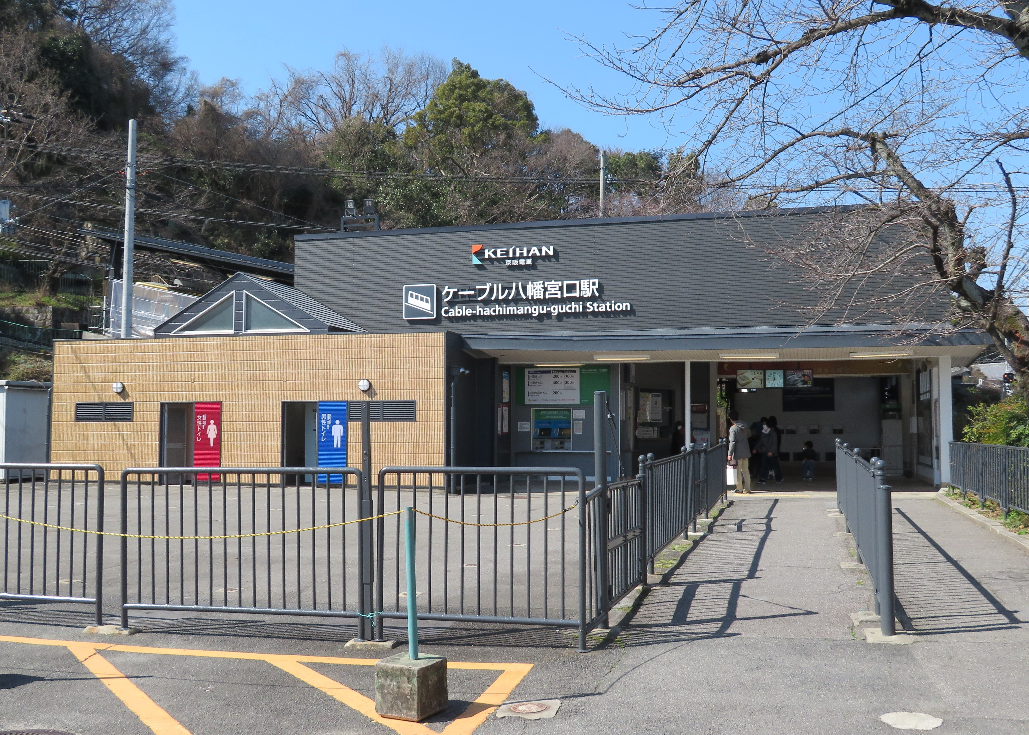 ケーブル八幡宮口駅